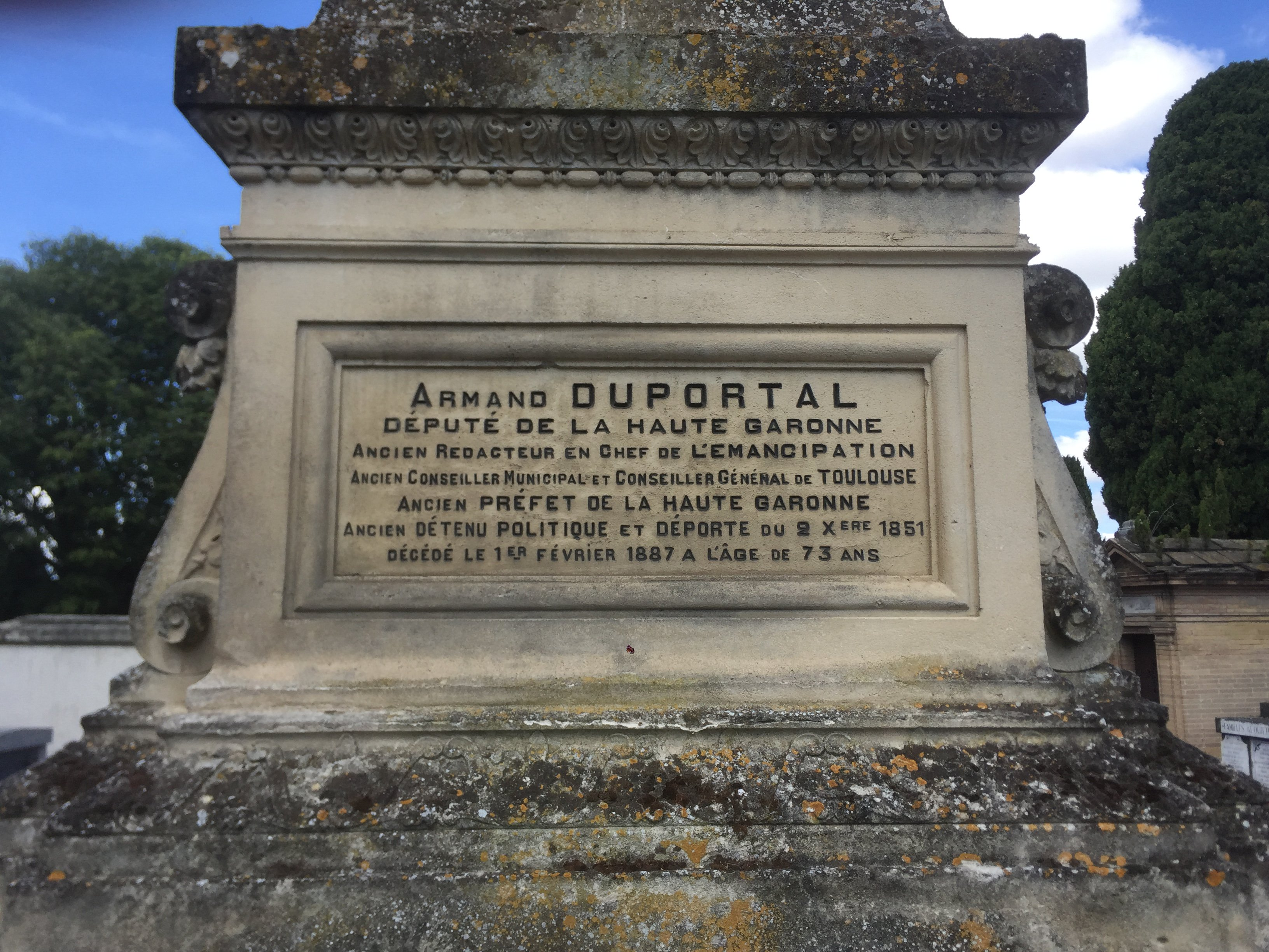 Monument érigé lors de la mort du toulousain Armand Duportal. Cimetière de Terre Cabade.